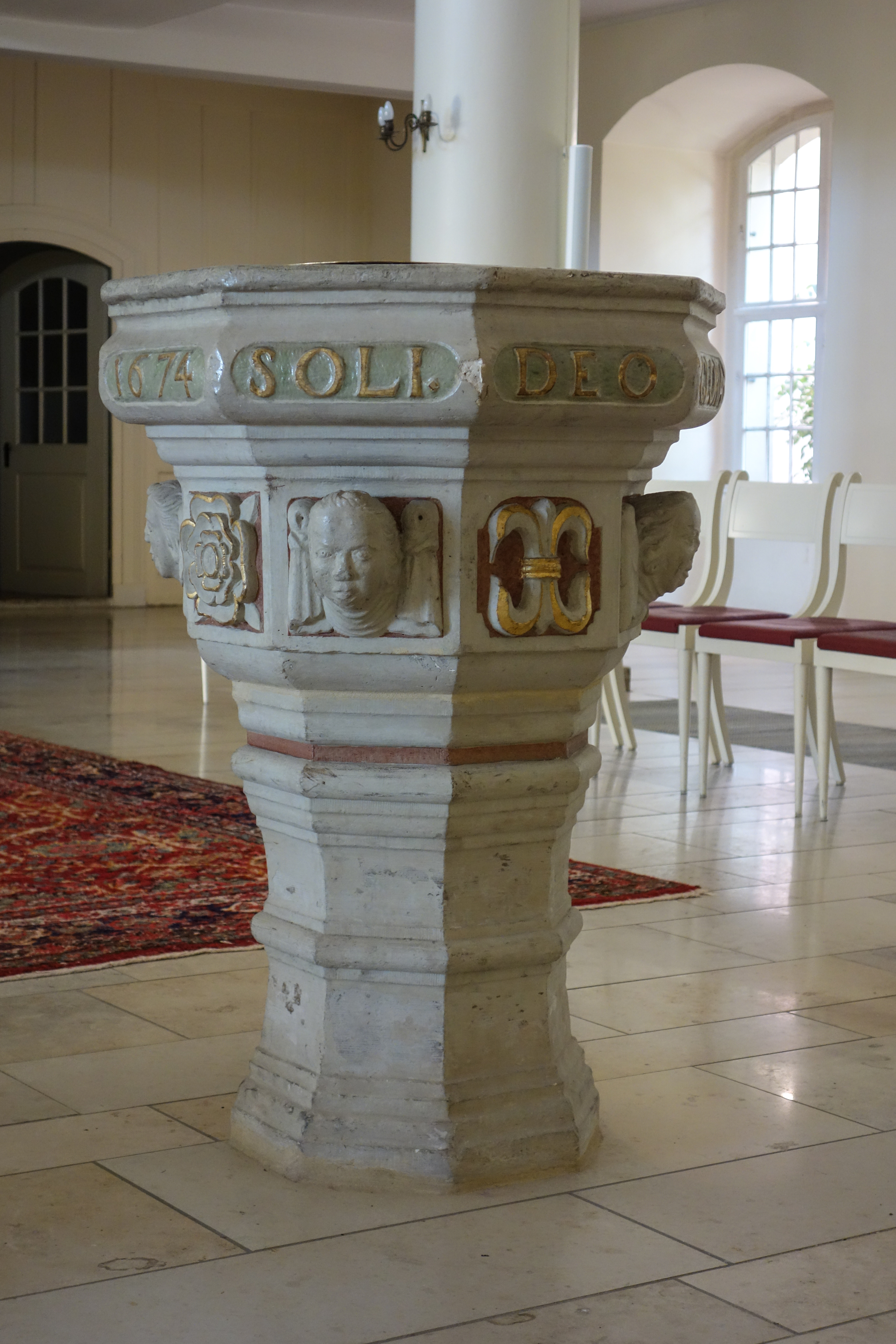 Stiftskirche Steterburg, Taufstein von 1674